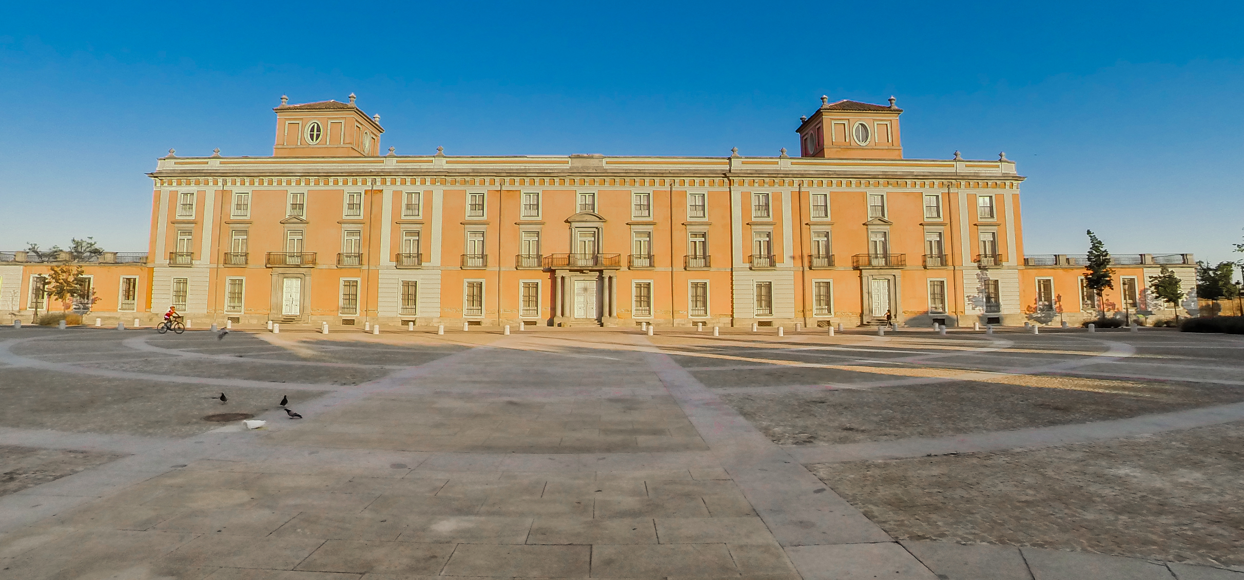 Palacio del Infante Don Luis en Boadilla del Monte